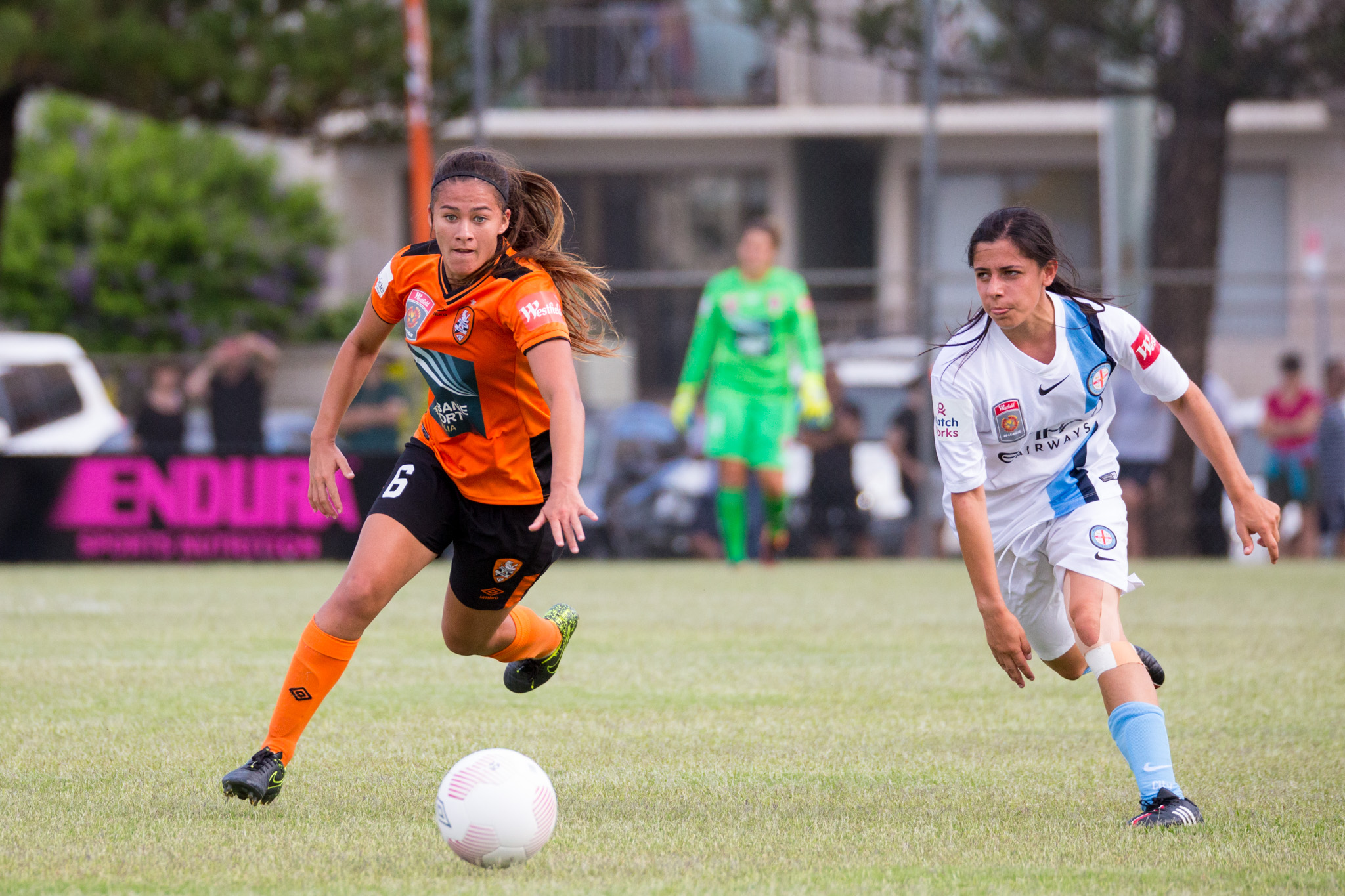 Angela Beard